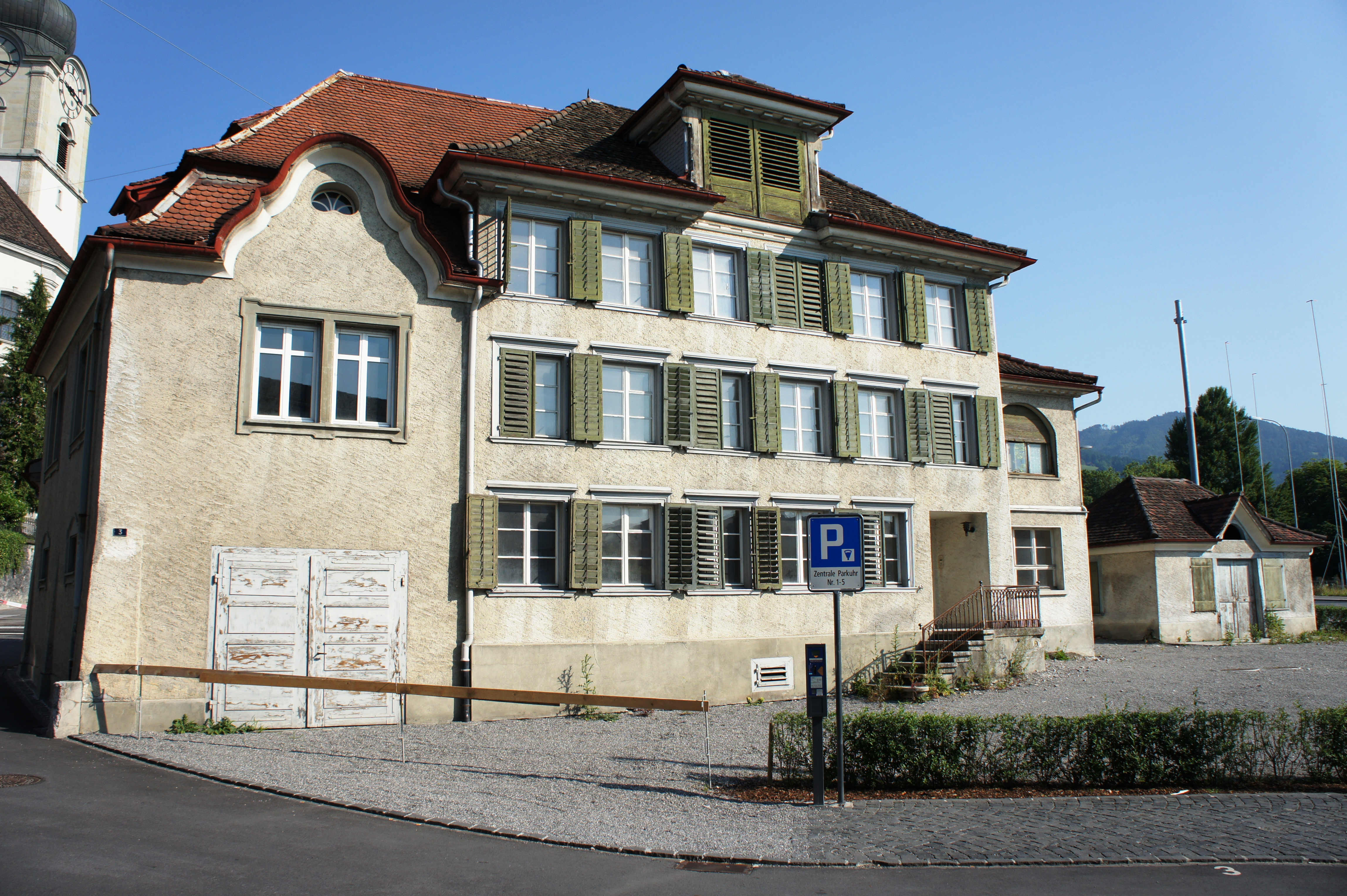 Blick us Süde uf s Balmerhuus z Altstetta. Links hine gseht me de Turm vo de kath. Chile.